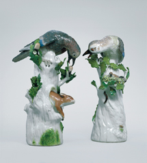 Modell von Johann Joachim Kändler, 1735 oder 1739/40 Ausformung und Staffierung Mitte 18. Jahrhundert Meißener Porzellan-Sammlung Stiftung Ernst Schneider in Schloss Lustheim